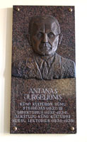 Antano Jurgelionio bareljefas